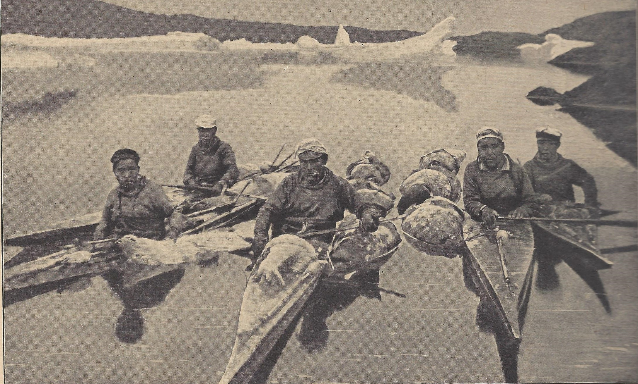 Fotografie heimkehrender Grönländer nach der Seehundjagd